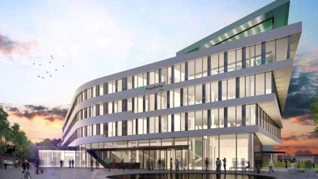 Nuebau Fraunhofer IEE in Kassel